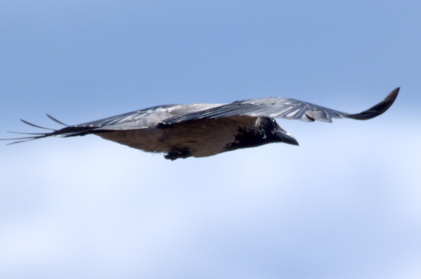 Lentävä varis.